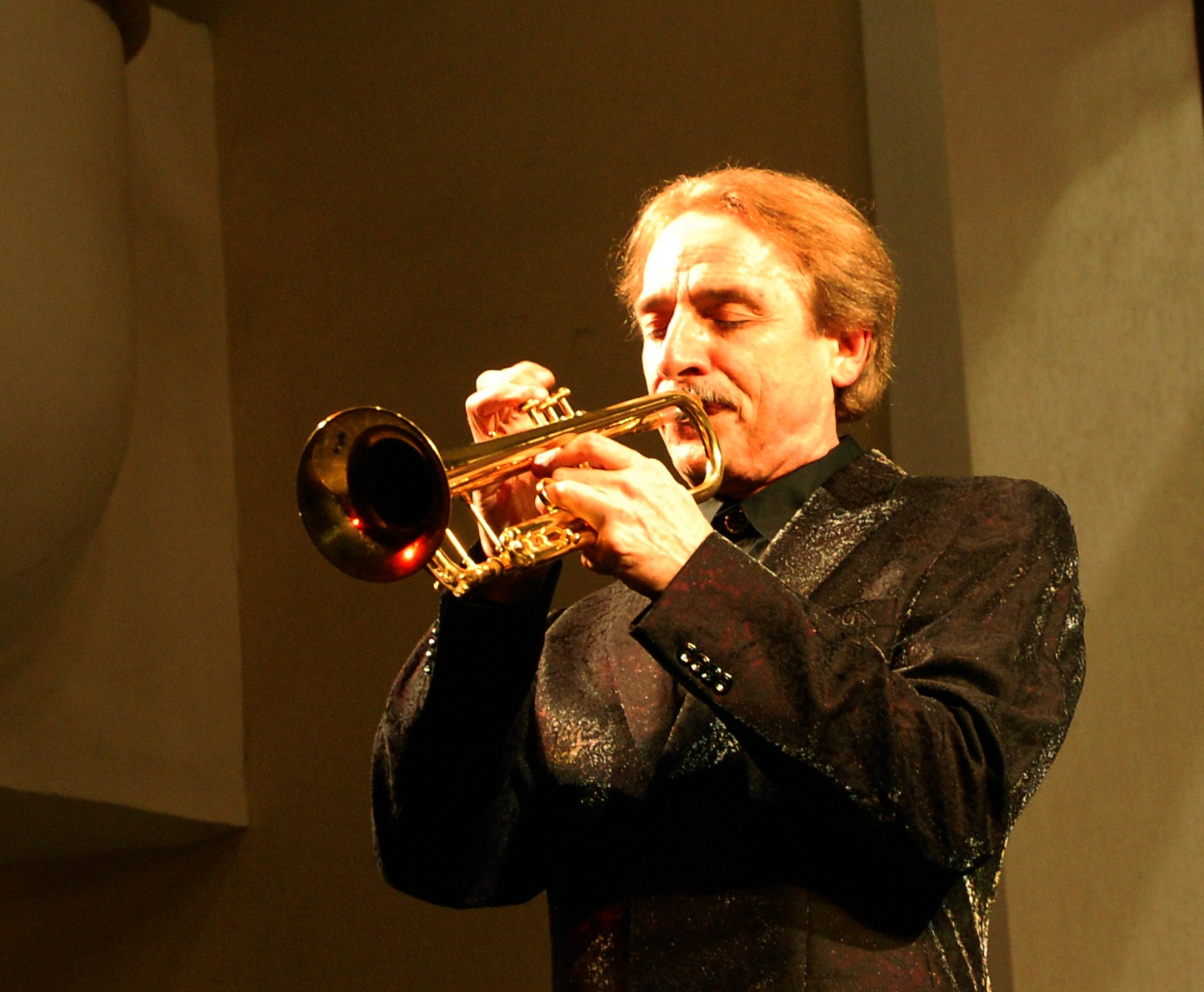 Трубач Аллен Виззутти, Ростов-на-Дону, 14.11.2010